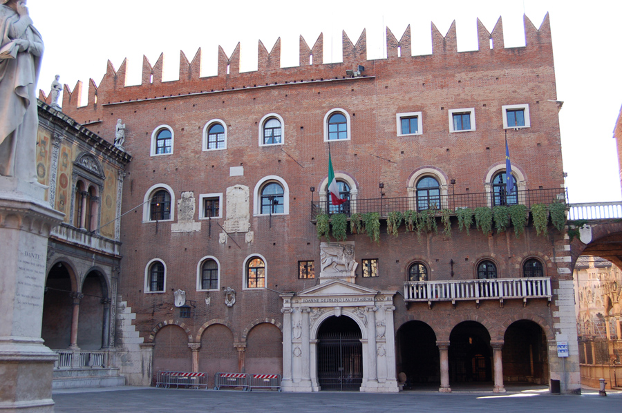 Fotografia del palazzo del Podestà a Verona